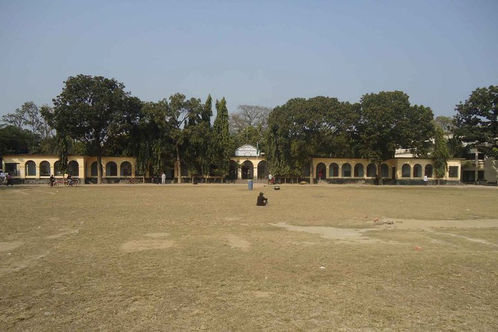 হরিমোহন সরকারি উচ্চ বিদ্যালয় উত্তর বঙ্গের অন্যতম প্রাচীন শিক্ষা প্রতিষ্ঠান। এটি ১৮৯৫ সালে প্রতিষ্ঠিত হয়।